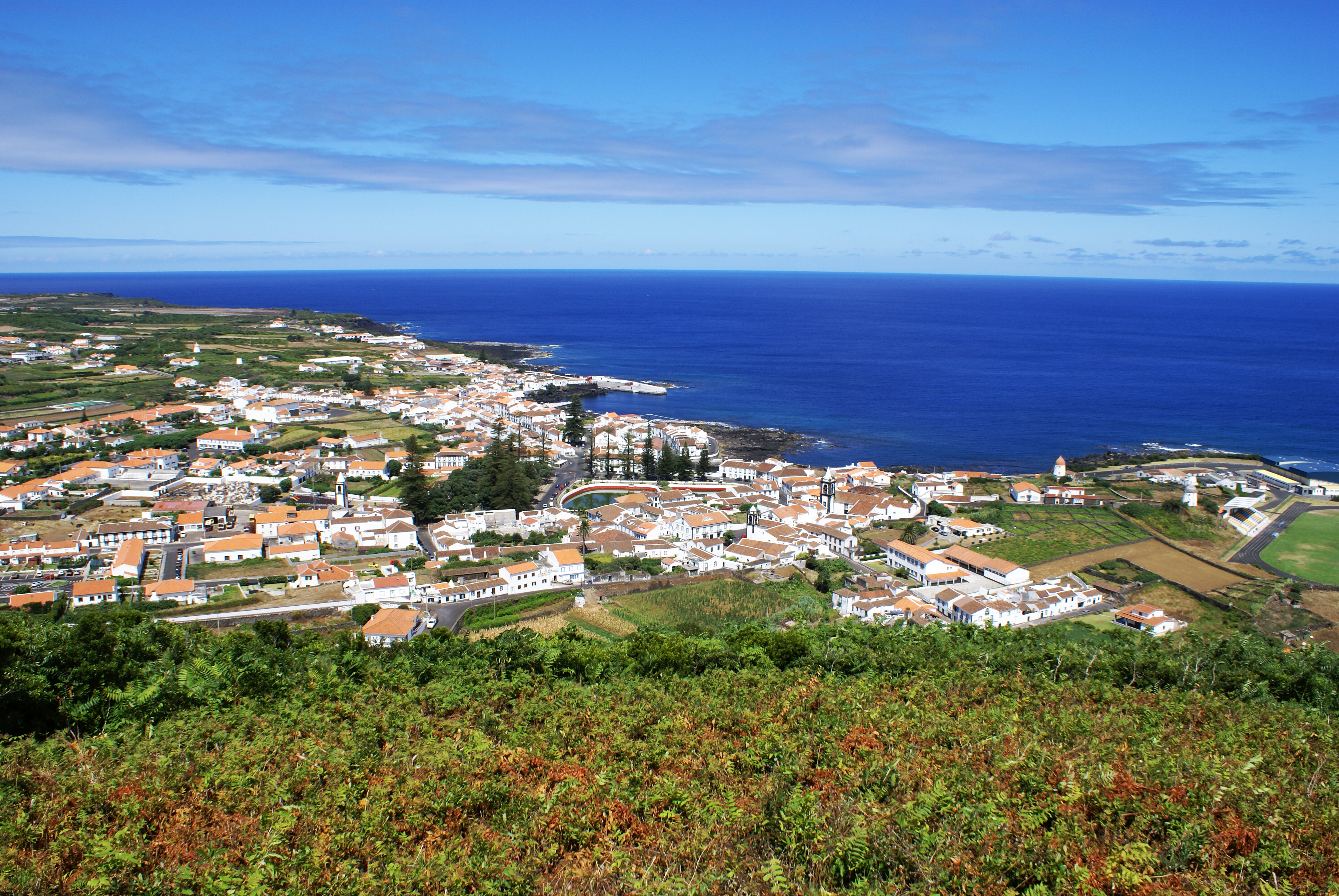 Santa Cruz da Graciosa, vista do adro da Ermida de Nossa Senhora da Ajuda, Monte de Nossa Senhora da Ajuda, ilha Graciosa, Açores, Portugal